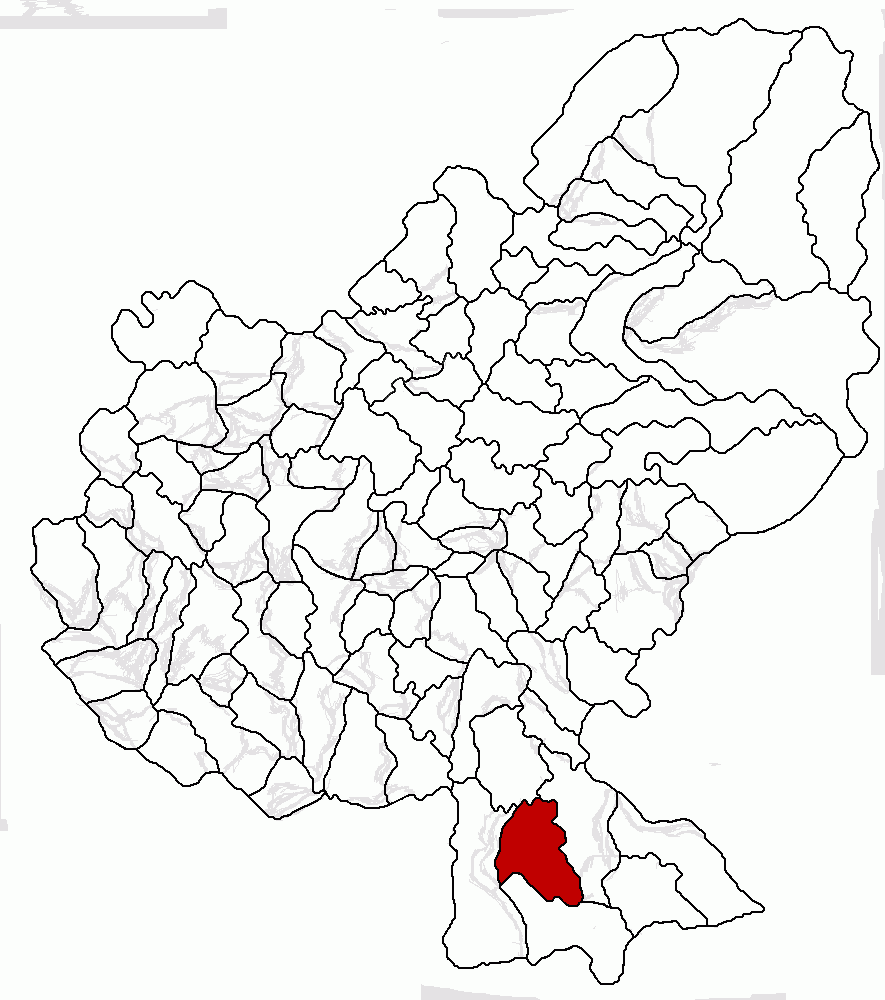 Categorie:Hărţi ale judeţului Mureş